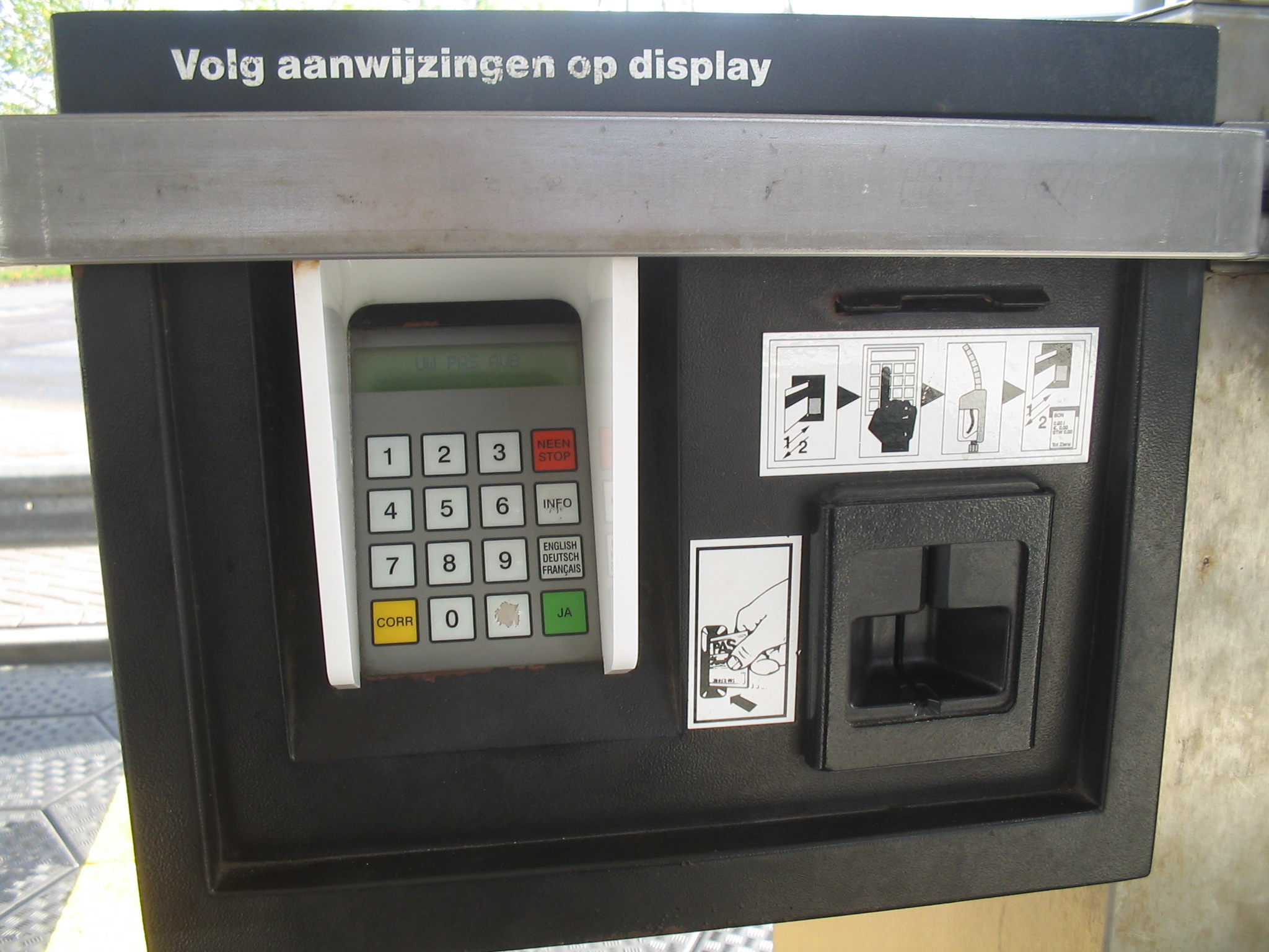 pinautomaat bij onbemande benzinestation